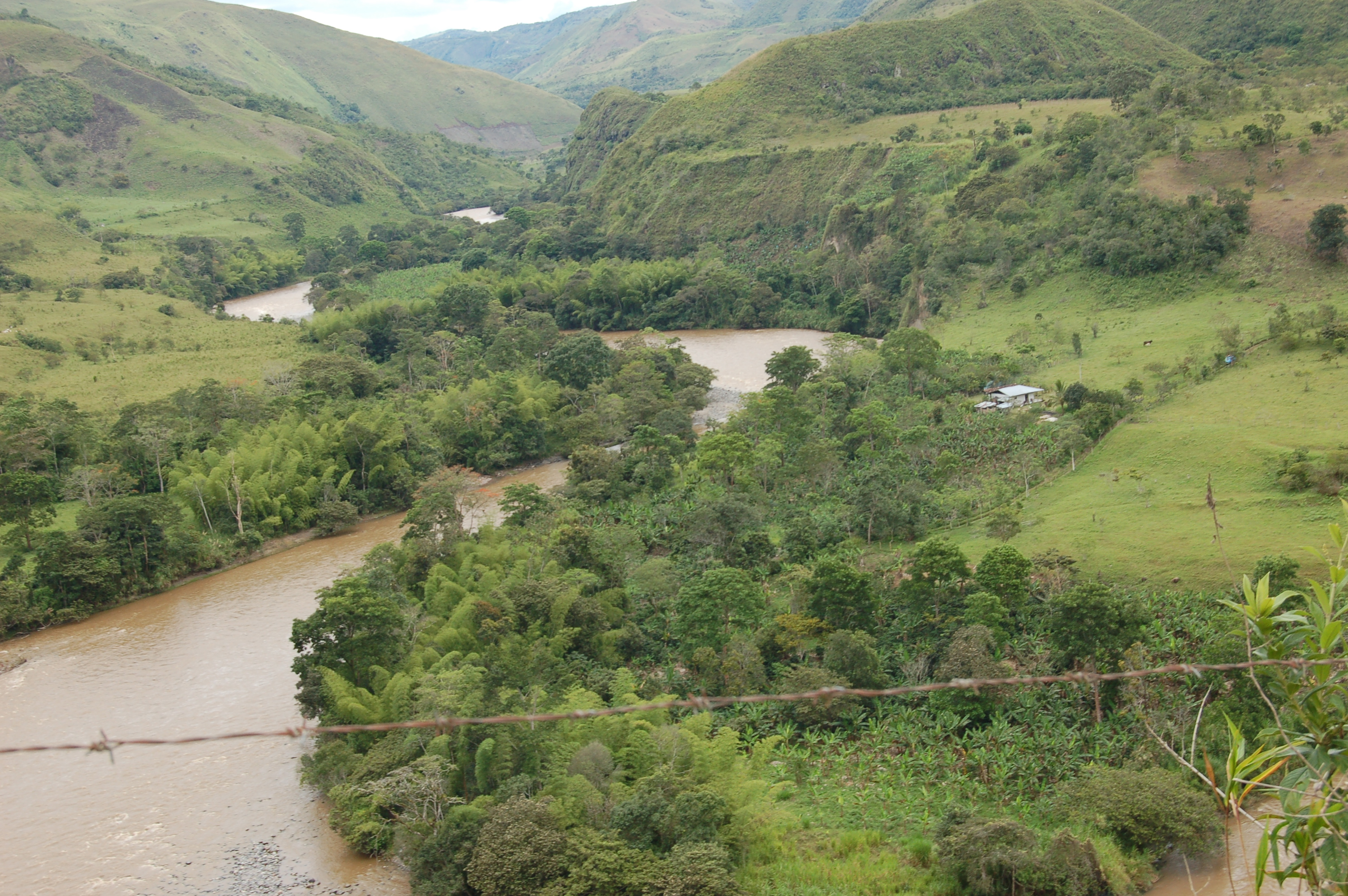 Paisaje de Pitalito a la Laguna(Rio Magdalena)